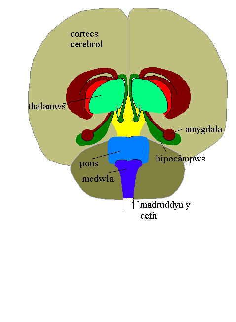 Rhannau o'r ymennydd wedi'u labelu